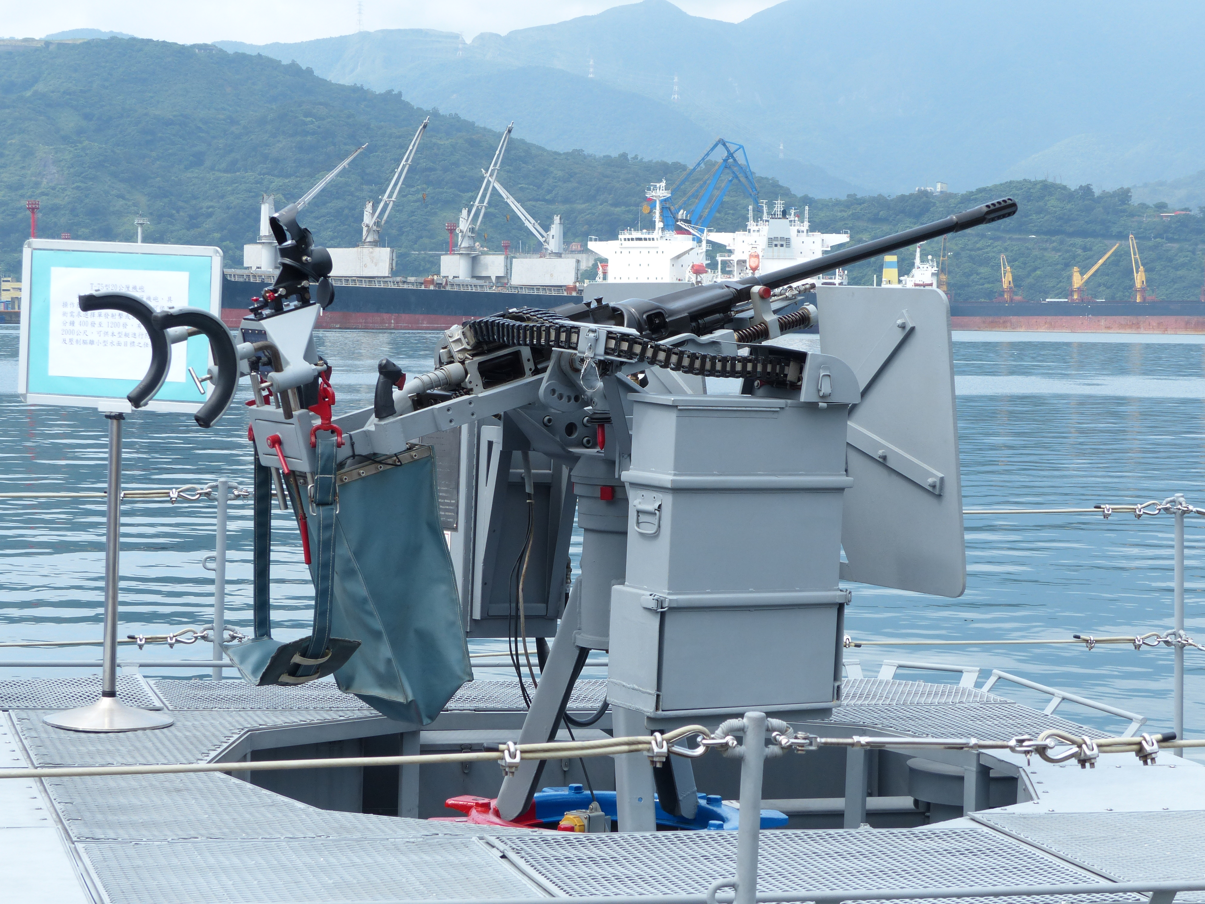 光華六號飛彈快艇FACG-77後部搭載的T-75S 20mm機關砲，攝於2013年中正軍港營區開放活動。